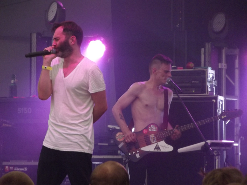 Zdjęcie zrobione podczas OFF Festival 2012 w Katowicach.